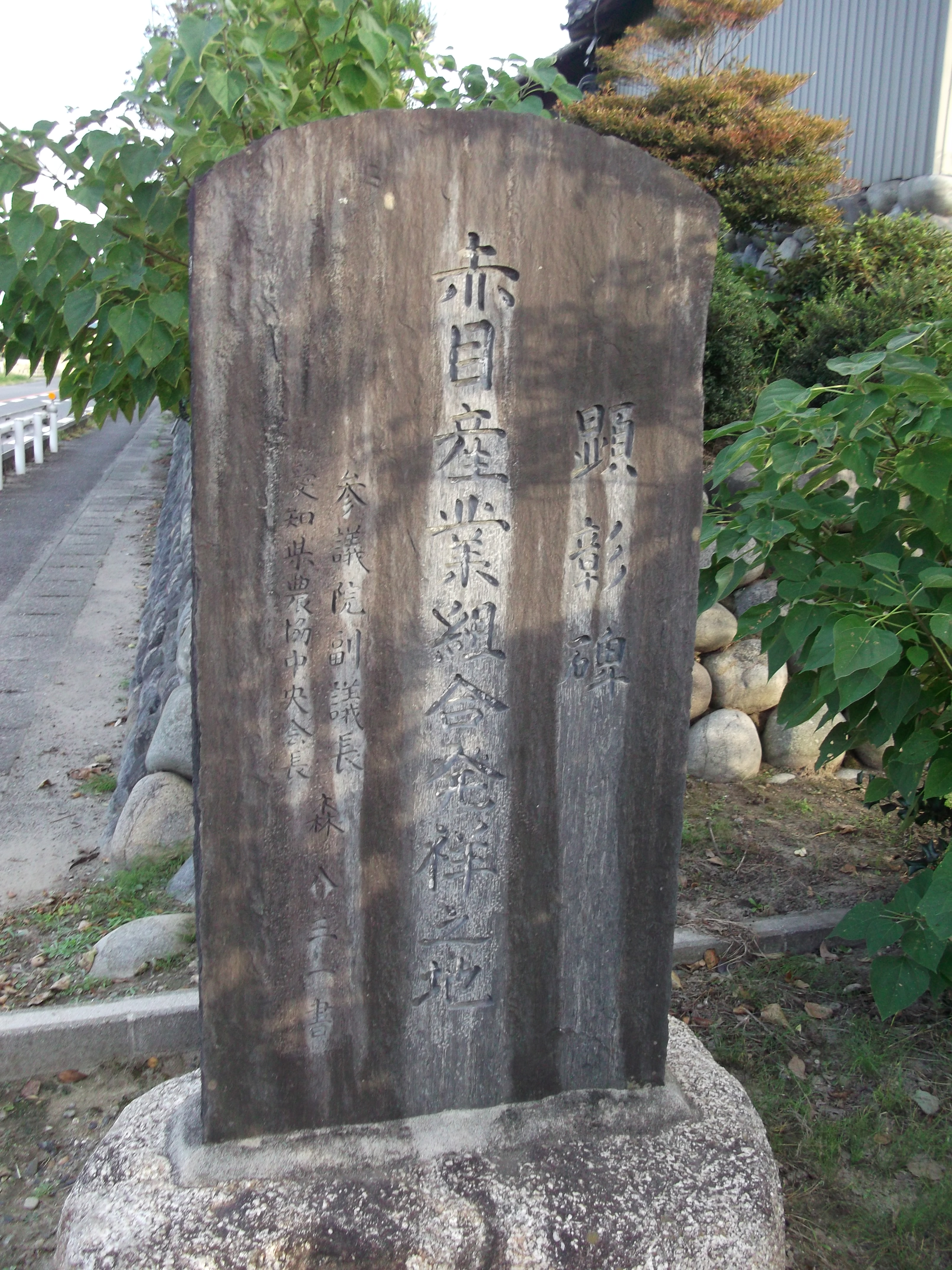 愛西市赤目町中屋敷に設置されている「赤目産業組合発祥地」碑（表面）